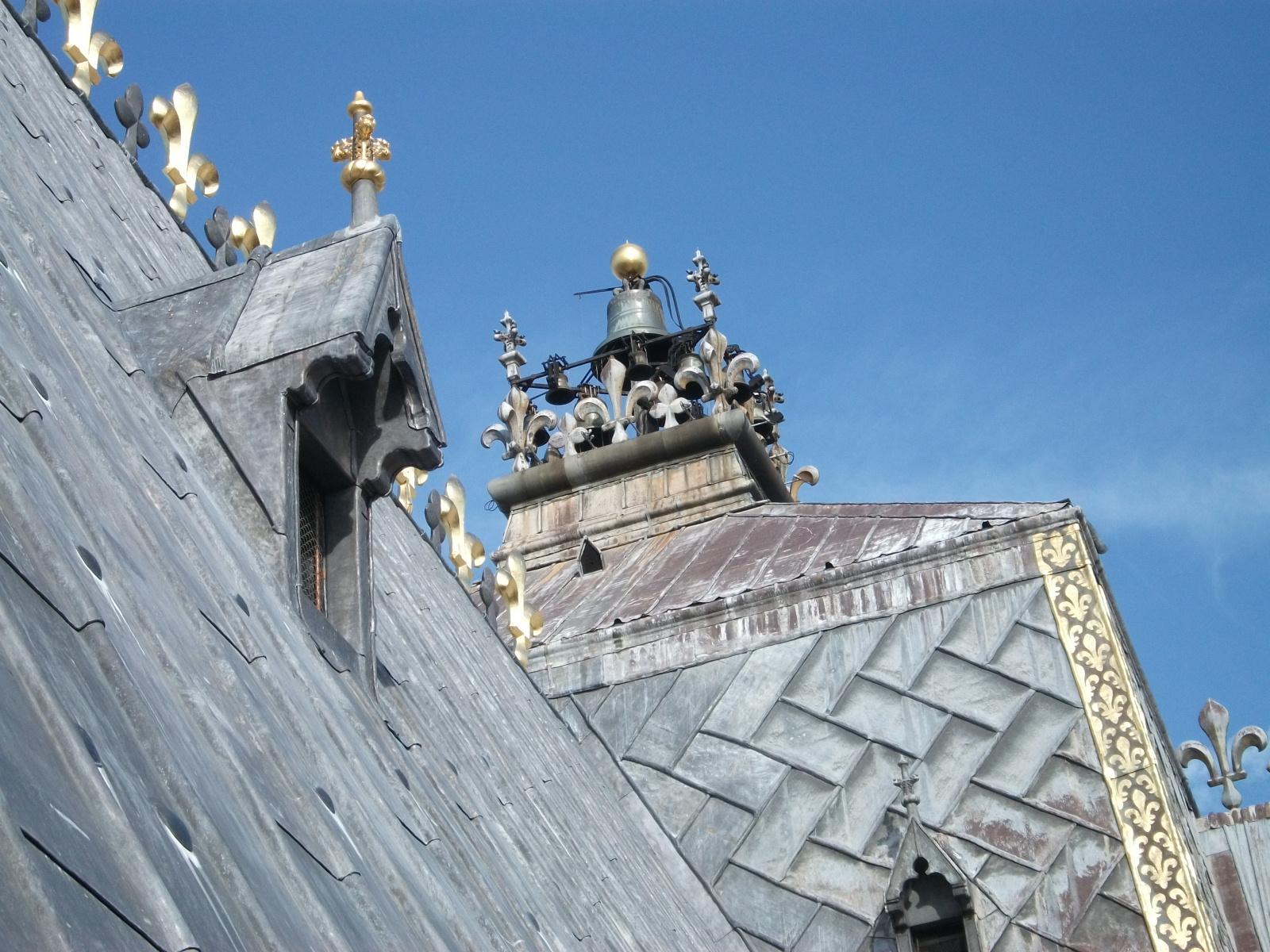 Carillon cathédrale de reims, il se trouve à la croisée de la nef et des transepts, sur le toit et est actionné par des poids.